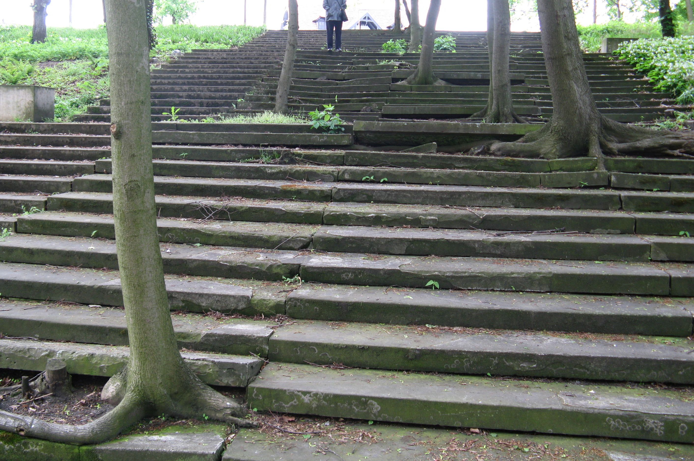 Freitreppe des historischen Ausstellungsparks ULAP in Berlin